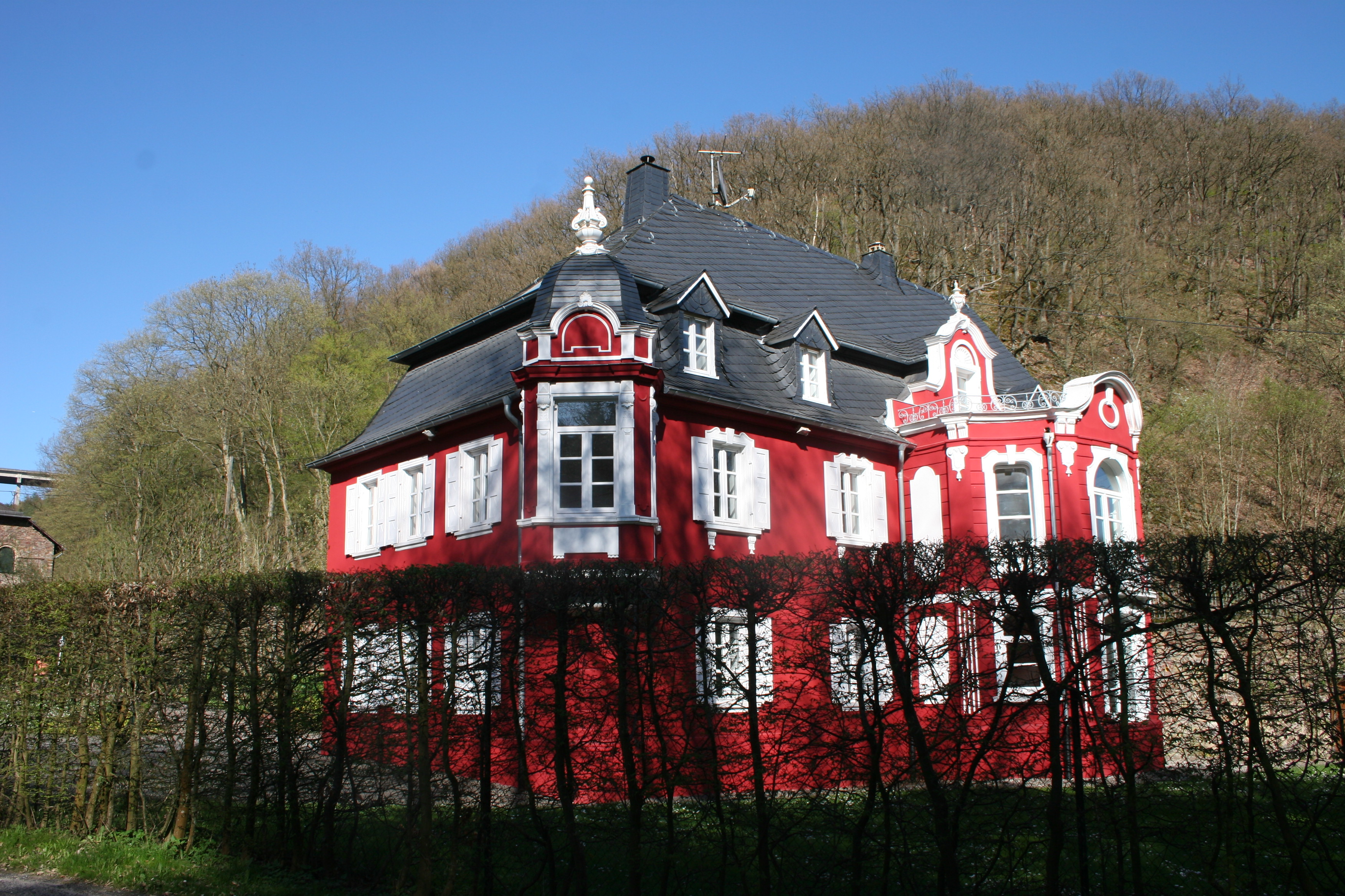 Stromberger Neuhütte, Fabrikantenvilla